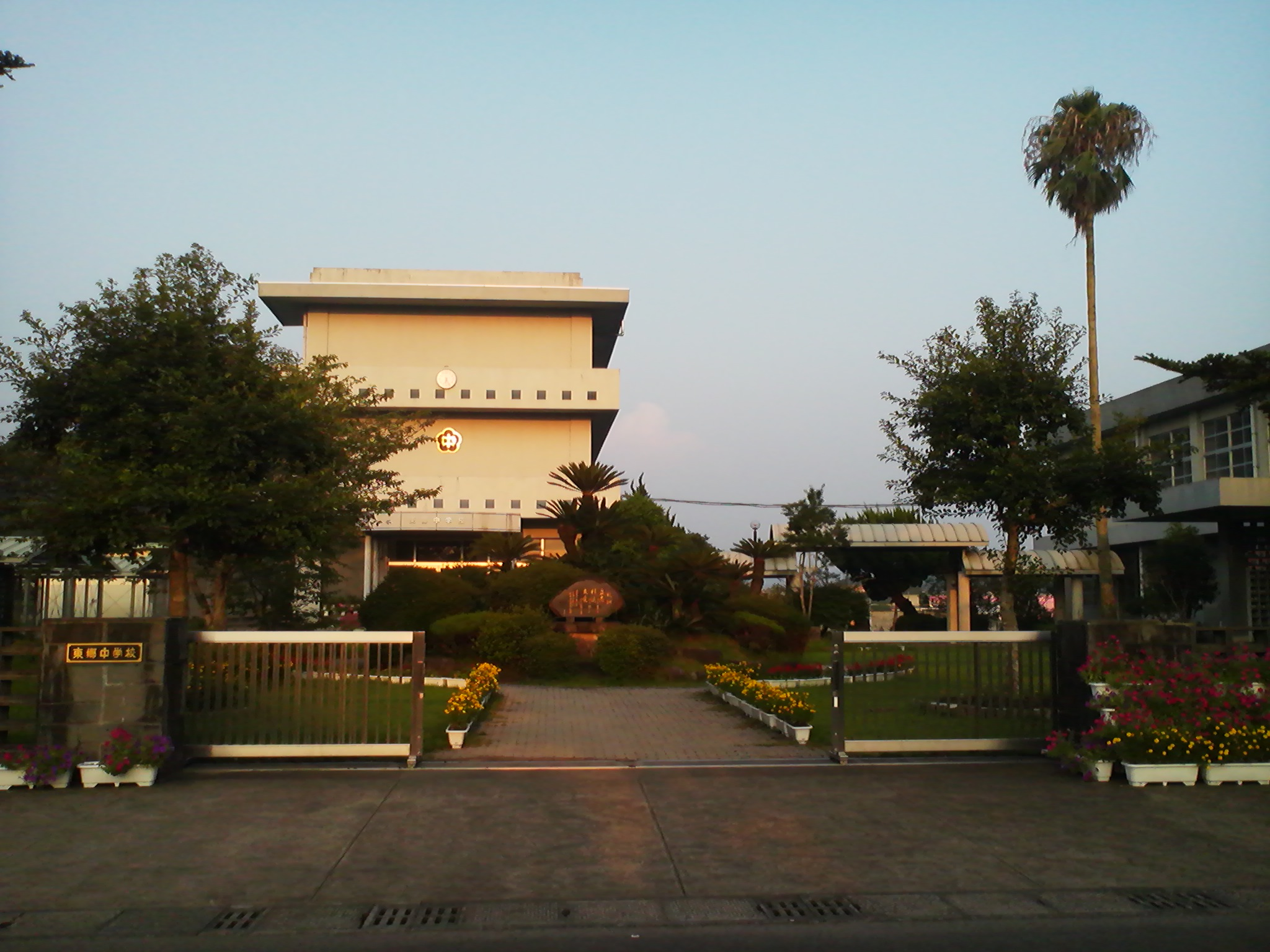 薩摩川内市立東郷中学校の外観。